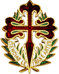 Croix de l'insigne de l'Ordre de Sant'Iago da Espeda